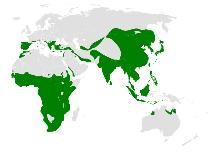 Cecropis distribution map